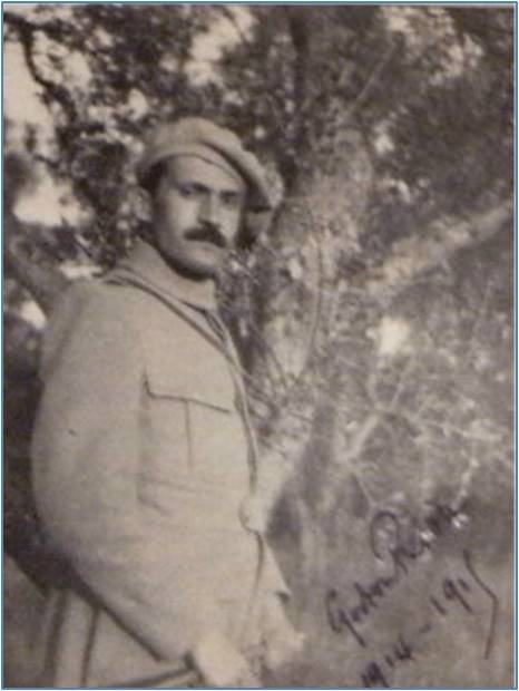 Cliché Jos Jullien